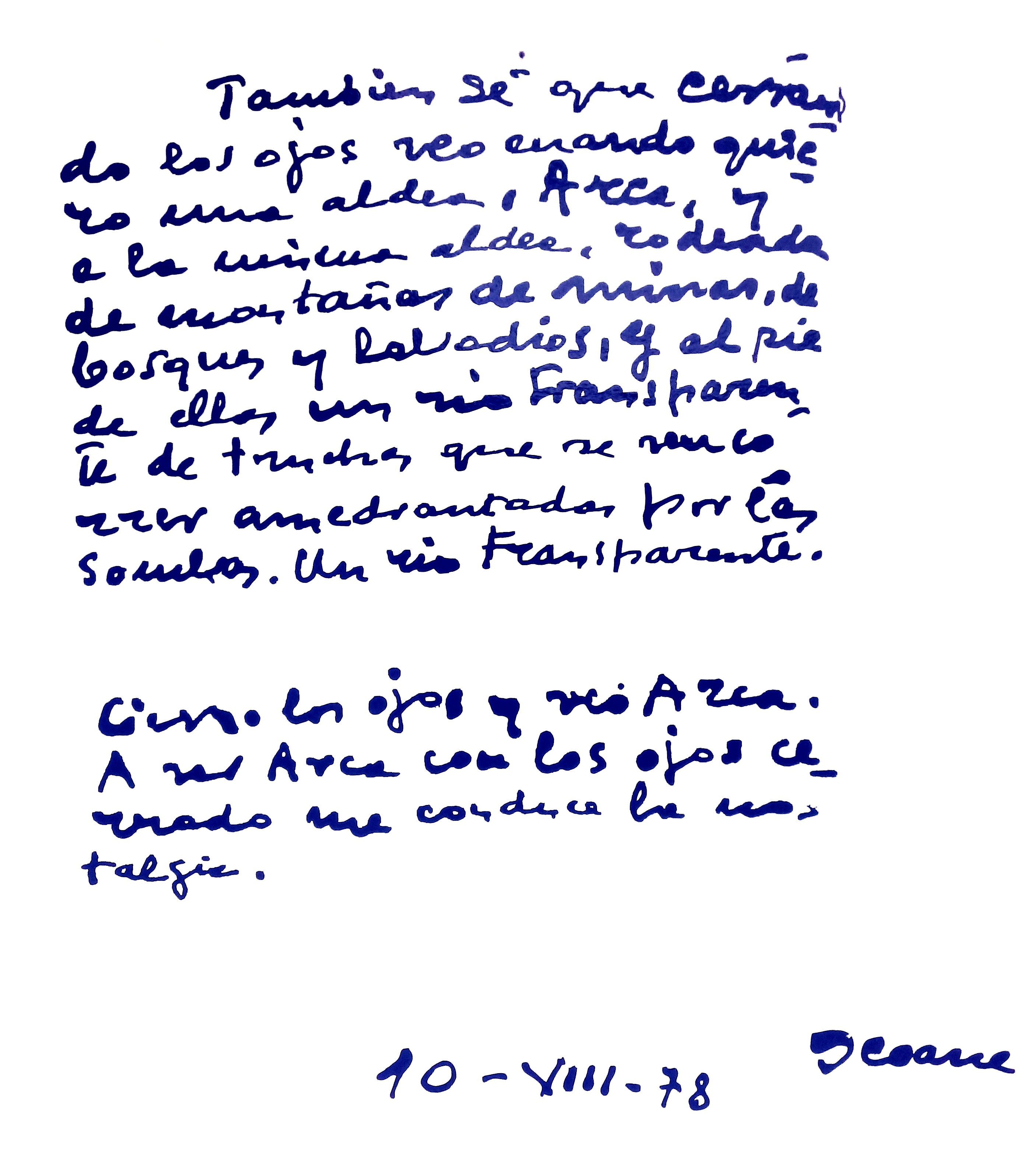 Gravado cun texto de Luís Seoane na sala do lucernario dentro do CSC "Luís Seoane", situado no Pedrouzo, O Pino.